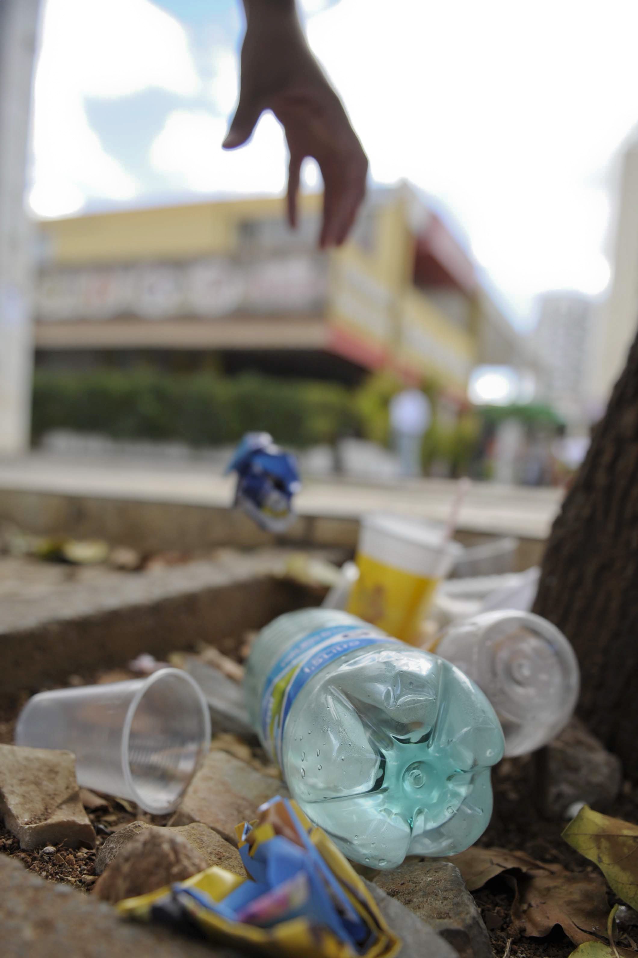 BIE - Banco de imagens externas - Lixo nas ruas do Setor Comercial Sul (SCS) - Brasília - DF. Está pronto para ser votado na Comissão de Constituição, Justiça e Cidadania (CCJ) projeto de lei que obriga municípios e o Distrito Federal a aplicarem multas a quem descarta lixo nas vias públicas. A proposta, de autoria do senador Pedro Taques (PDT-MT), tem parecer favorável do relator, senador Randolfe Rodrigues (PSOL-AP). O Projeto de Lei do Senado (PLS) 523/2013 acrescenta à Política Nacional de Resíduos Sólidos (Lei 12.305/2010) a proibição de descarte irregular de resíduos ou rejeitos em vias públicas. Além disso, a proposta exige que os municípios e o DF regulamentem a forma correta do descarte e estabeleçam multas para quem descumprir a regra. O projeto dá o prazo de dois anos para que o DF e os municípios regulamentem a nova lei. Foto: Edilson Rodrigues/Agência Senado